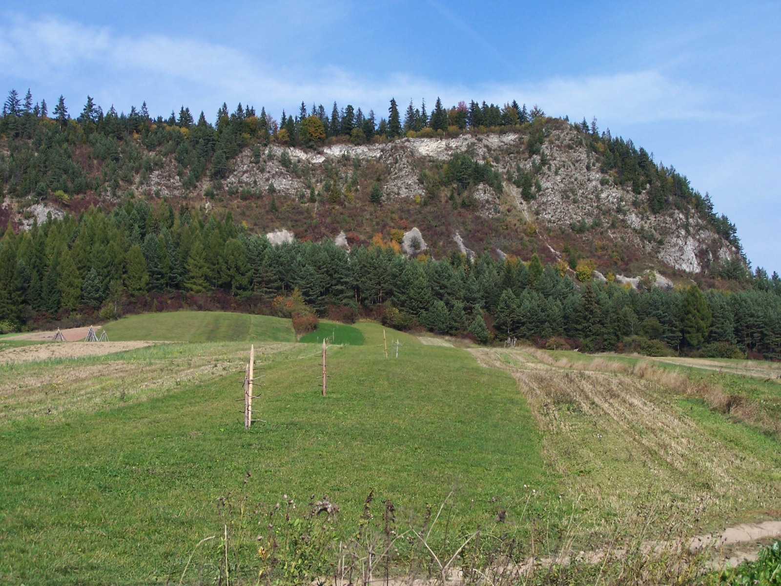 Skały Zamczysko w Pieninach Czorsztyńskich. Widok z szosy do Sromowiec Niżnich